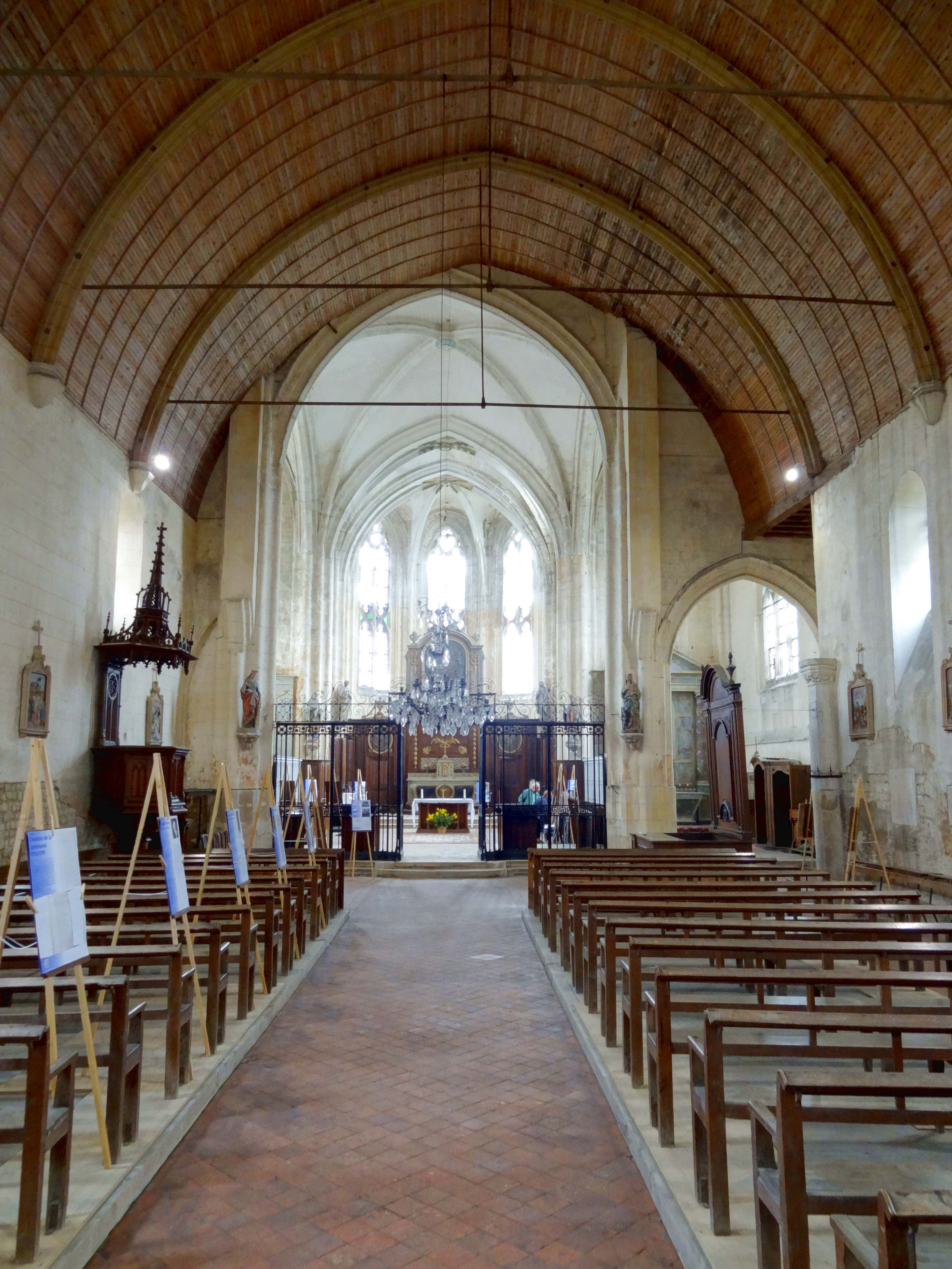 Intérieur de l'église - voir titre.